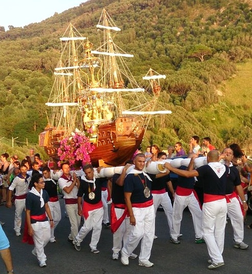 Processione del Sacro Capello di Palmi dalla Marina di Palmi alla Concattedrale di san Nicola